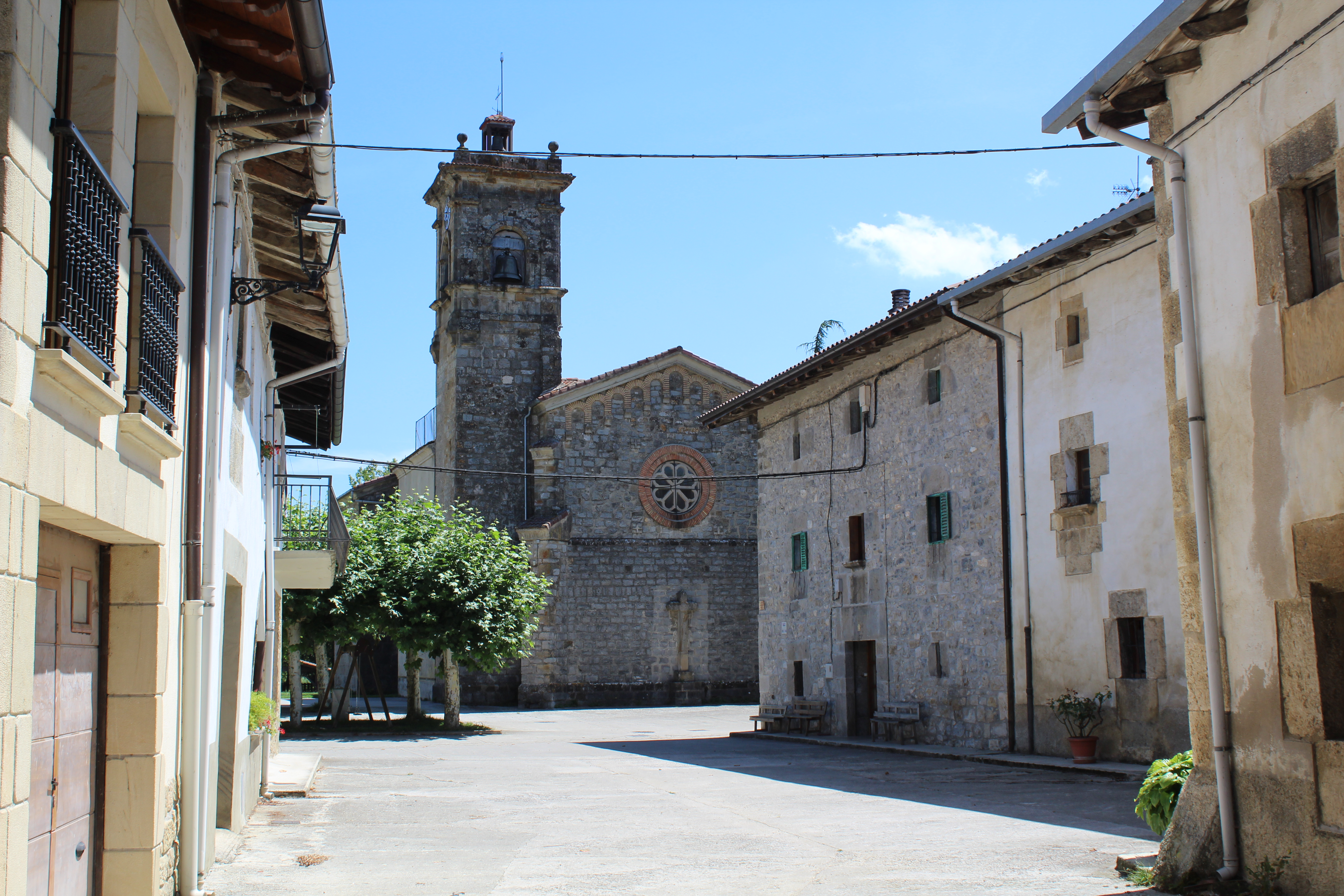 Arruazuko kaleak